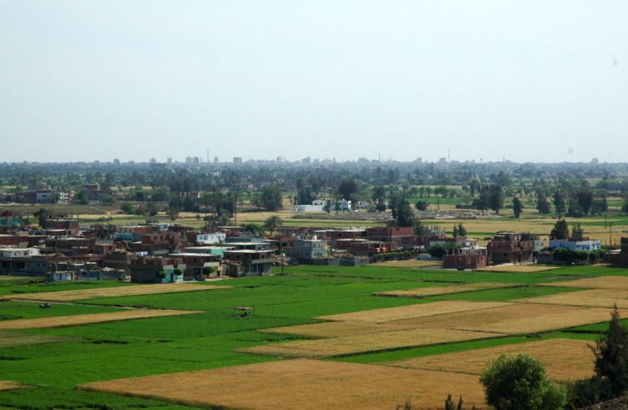 Blick auf den archäologischen Fundplatz Tell el-Dab'a / Avaris; im Vordergrund das Dorf 'Ezbet Rushdi; in der Bildmitte das Grabungshaus des Österreichischen Archäologischen Instituts; Blick in südöstliche Richtung